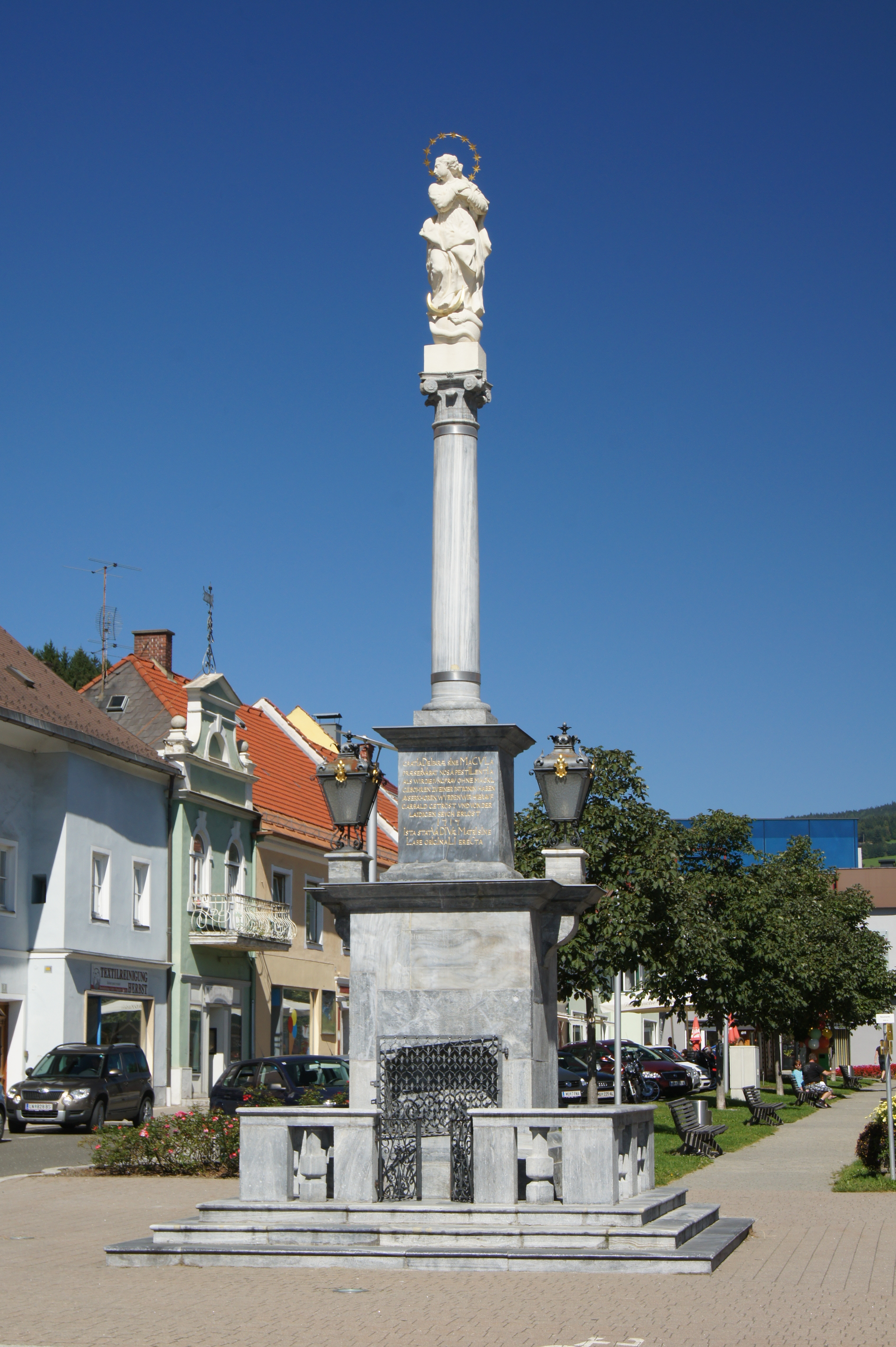 Mariensäule, Pestsäule